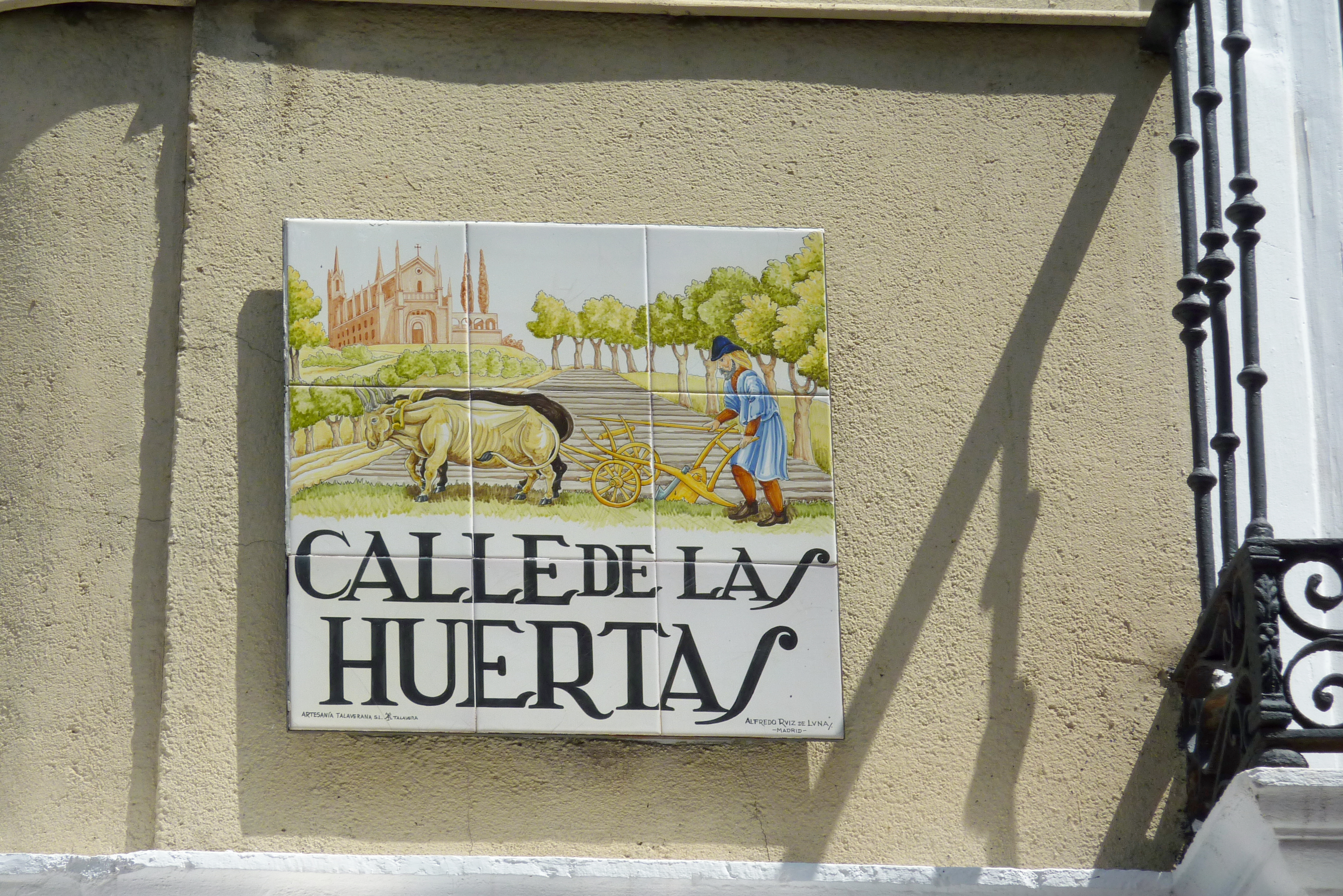 Straßenschild: Calle de las Huertas, in Madrid (Spanien), mit Signatur von Alfredo Ruiz de Luna González und der Keramikmanufaktur Artesanía Talaverana S.L. in Talavera de la Reina